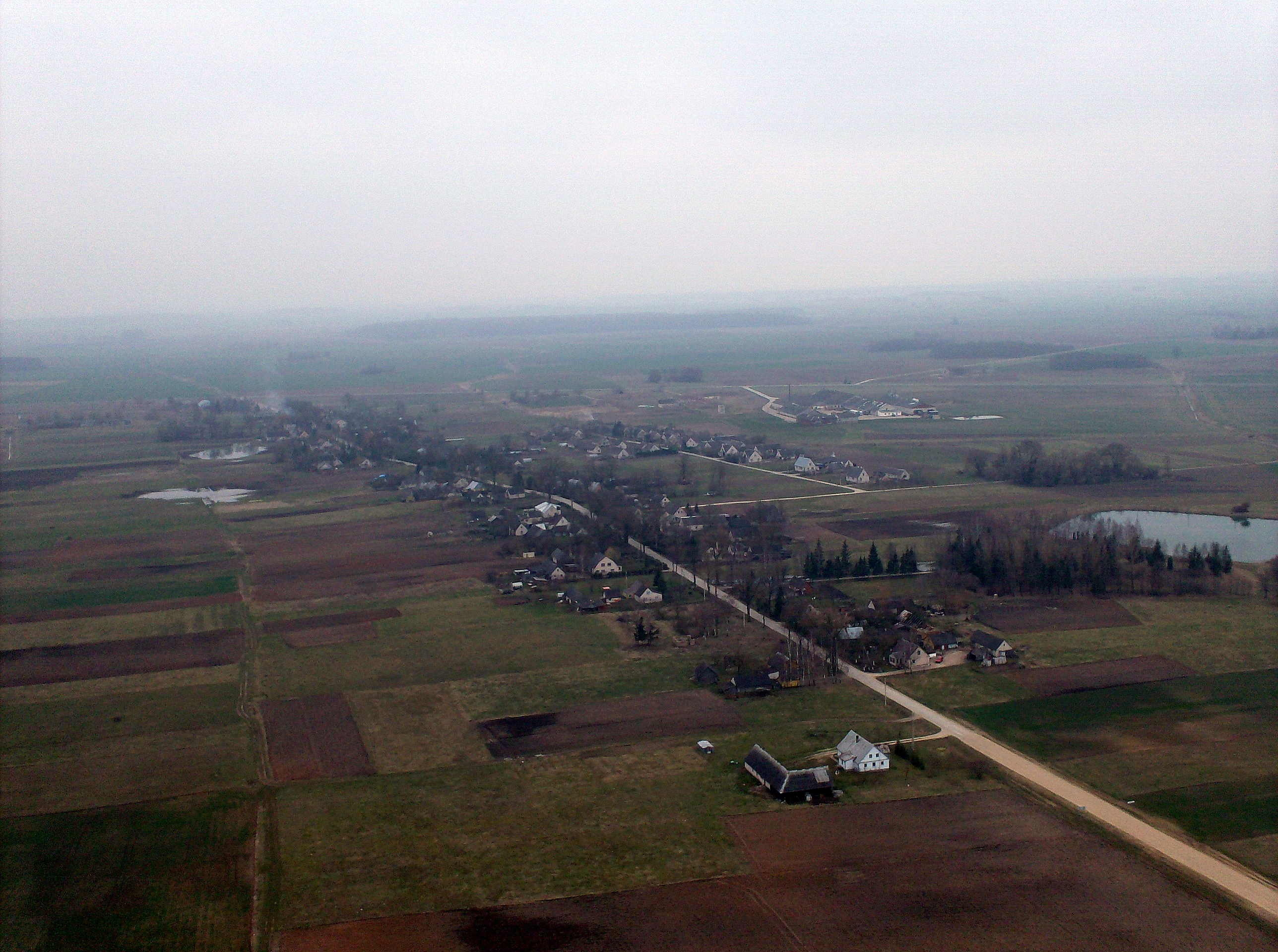 Titkoniai. Fotografuota 2008-04-05.